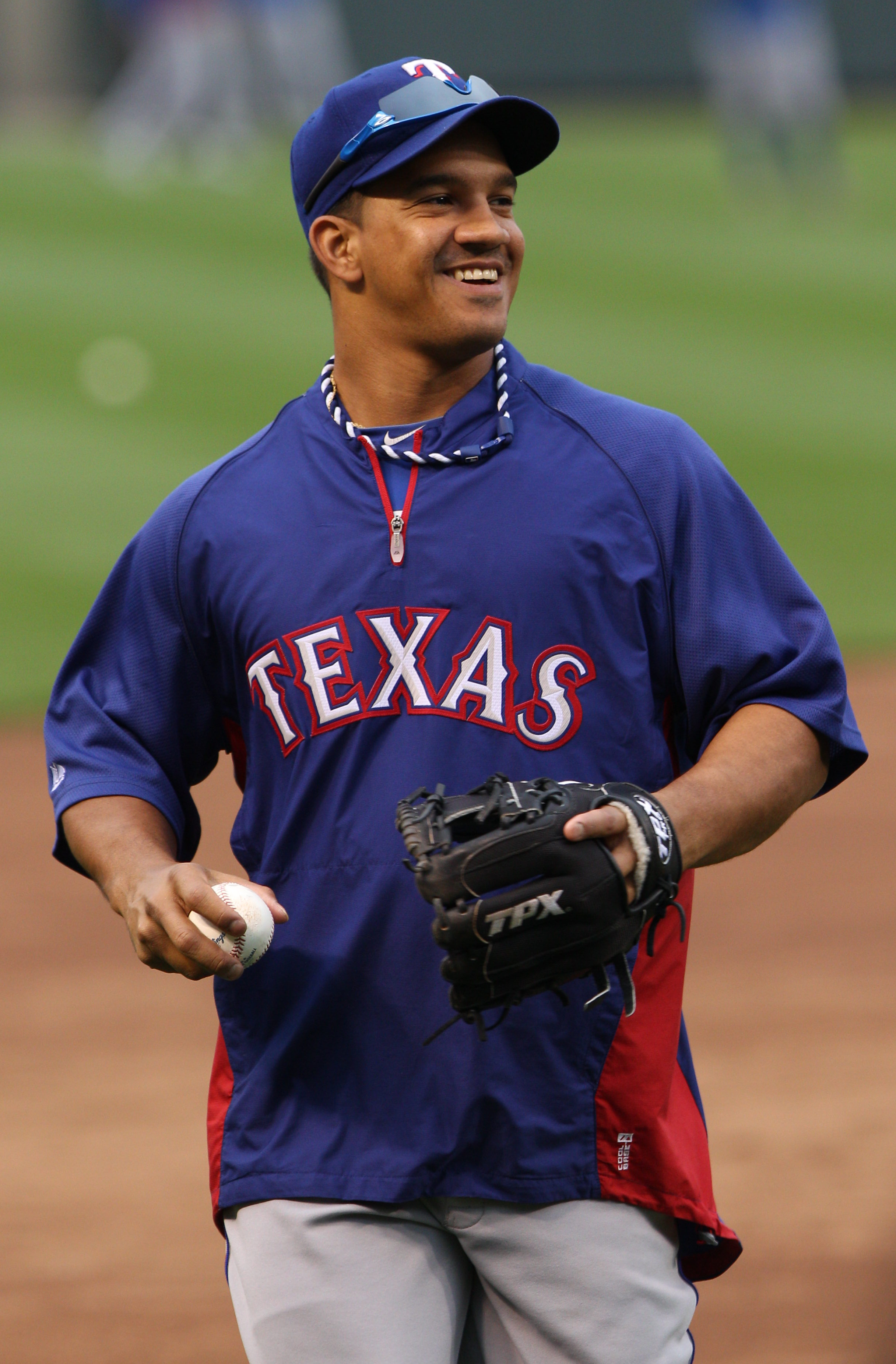 Alberto González